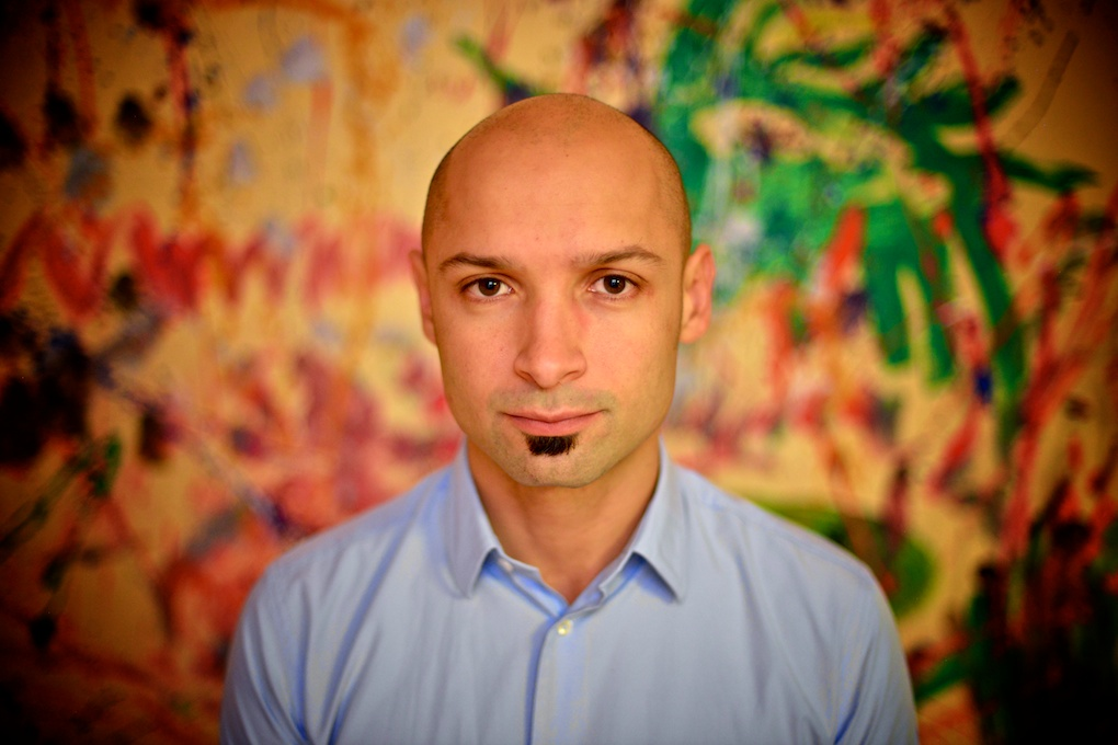 Jurgis Didžiulis